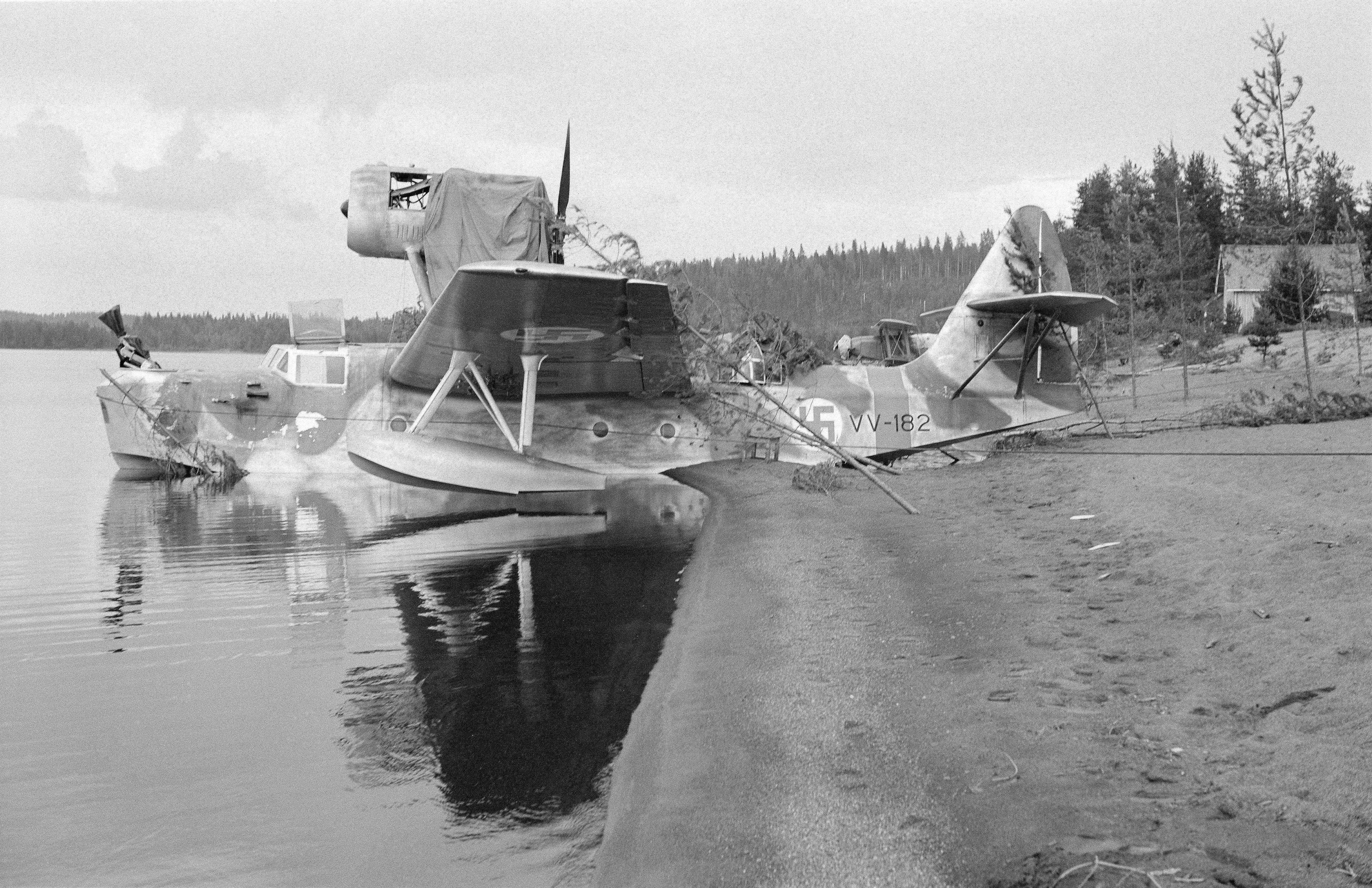 Lentoveneitä Hirvirannassa.